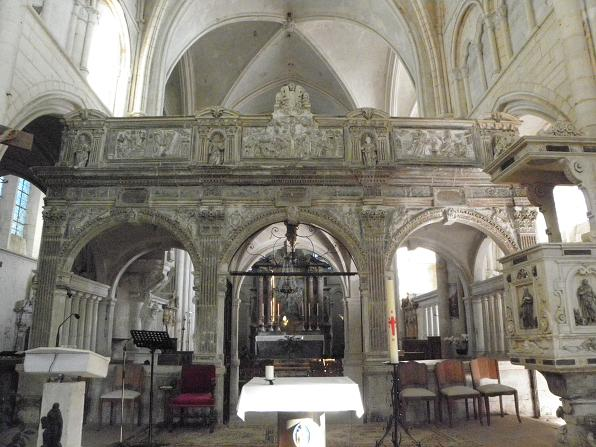 Jubé de la collégiale Saint-Pierre-et-Saint-Paul d'Appoigny (89).